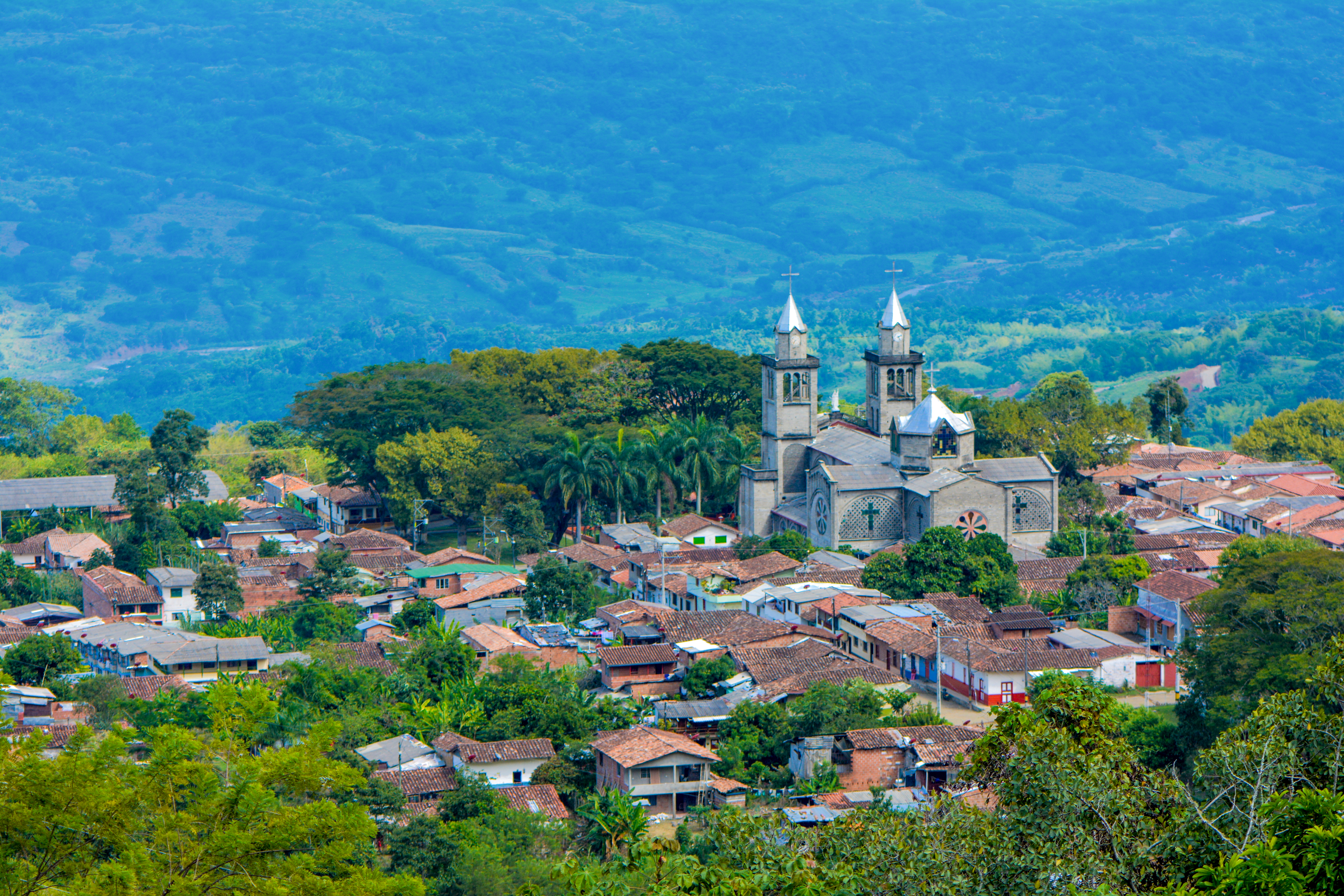 Palermo, Antioquia. Fotografía: Giovanny Guzmán